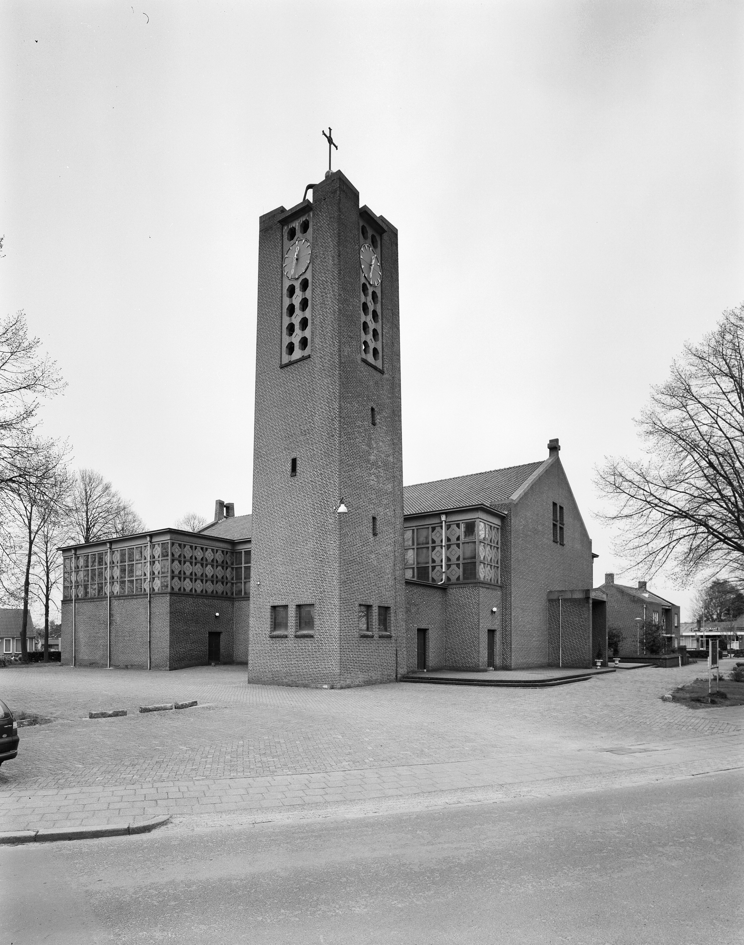 Sint Josephkerk: Overzicht noordwestgevel met terzijde staande kerktoren (opmerking: Gefotografeerd voor Monumenten In Nederland Limburg, bladzijde 65)